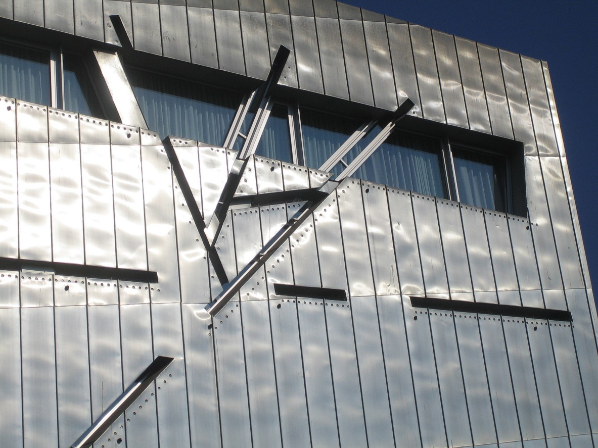 Berlin-Kreuzberg. Jüdisches Museum, Neubau von Daniel Libeskind, Detail der Fassade. Eigenes Foto, 2005. Fotograf: Manfred Brückels.